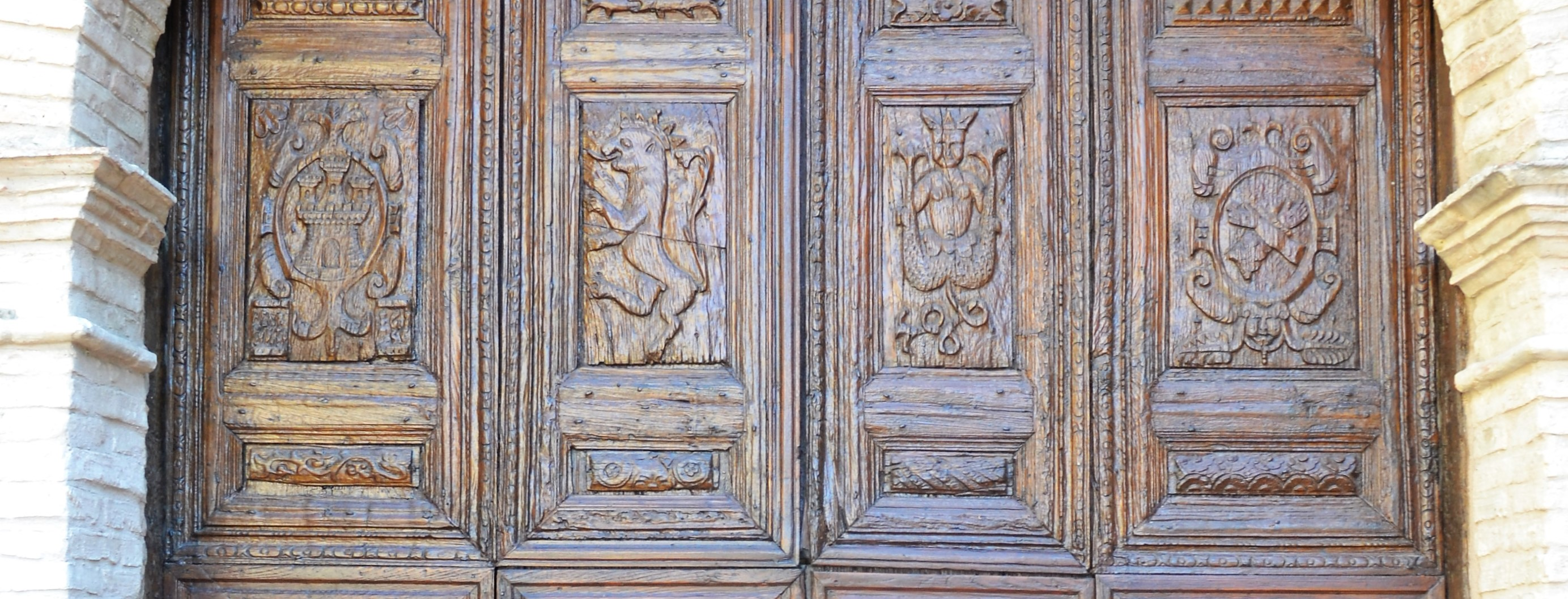 Lo stemma di destra si riferisce all'Ordine dei Frati Minori Francescani.